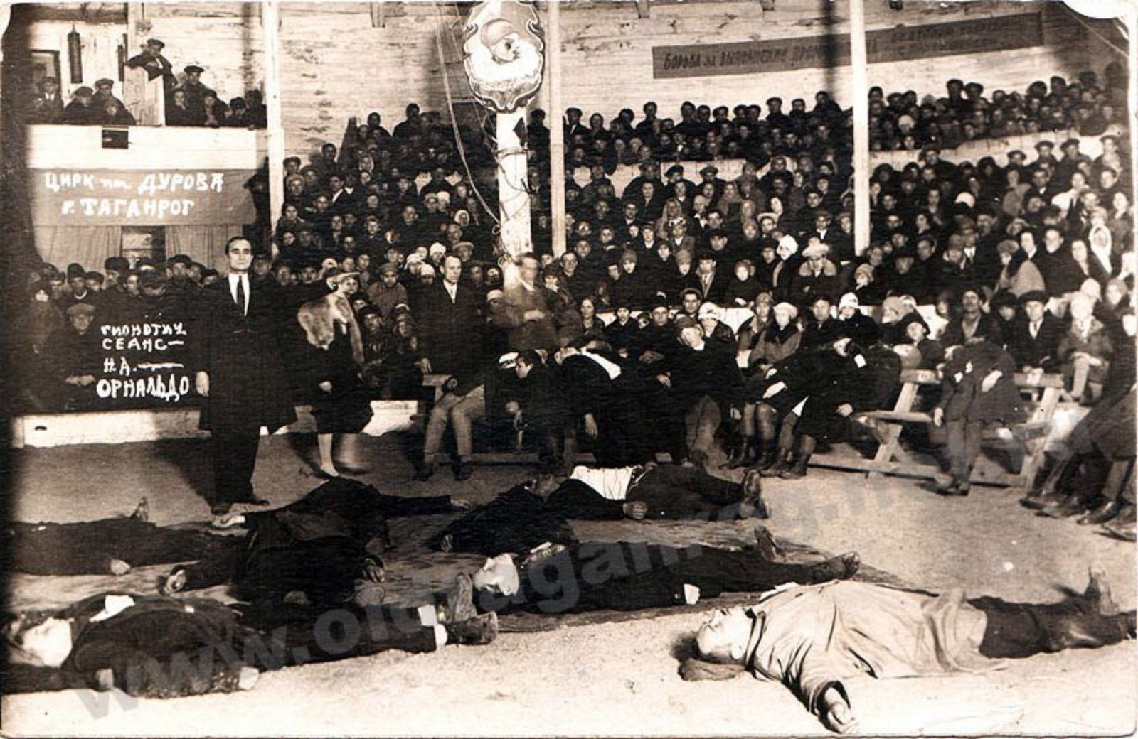 Российский гипнотизёр Николай Александрович Смирнов / Орнальдо, Цирк им. Дурова, Таганрог.